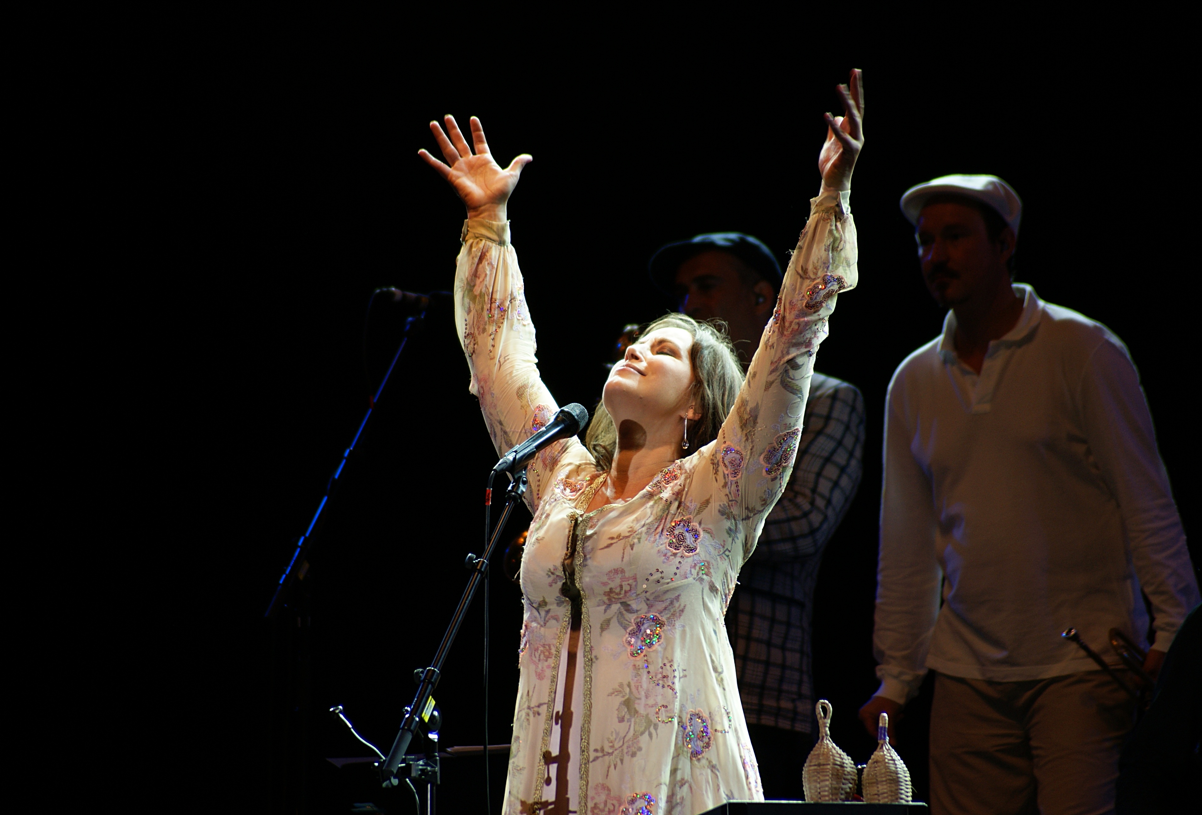 Lisa Nilsson på Stockholms kulturfestival 2010. I bakgrunden Eric Häussler på saxofon (skymd) och Peter Asplund, trumpet